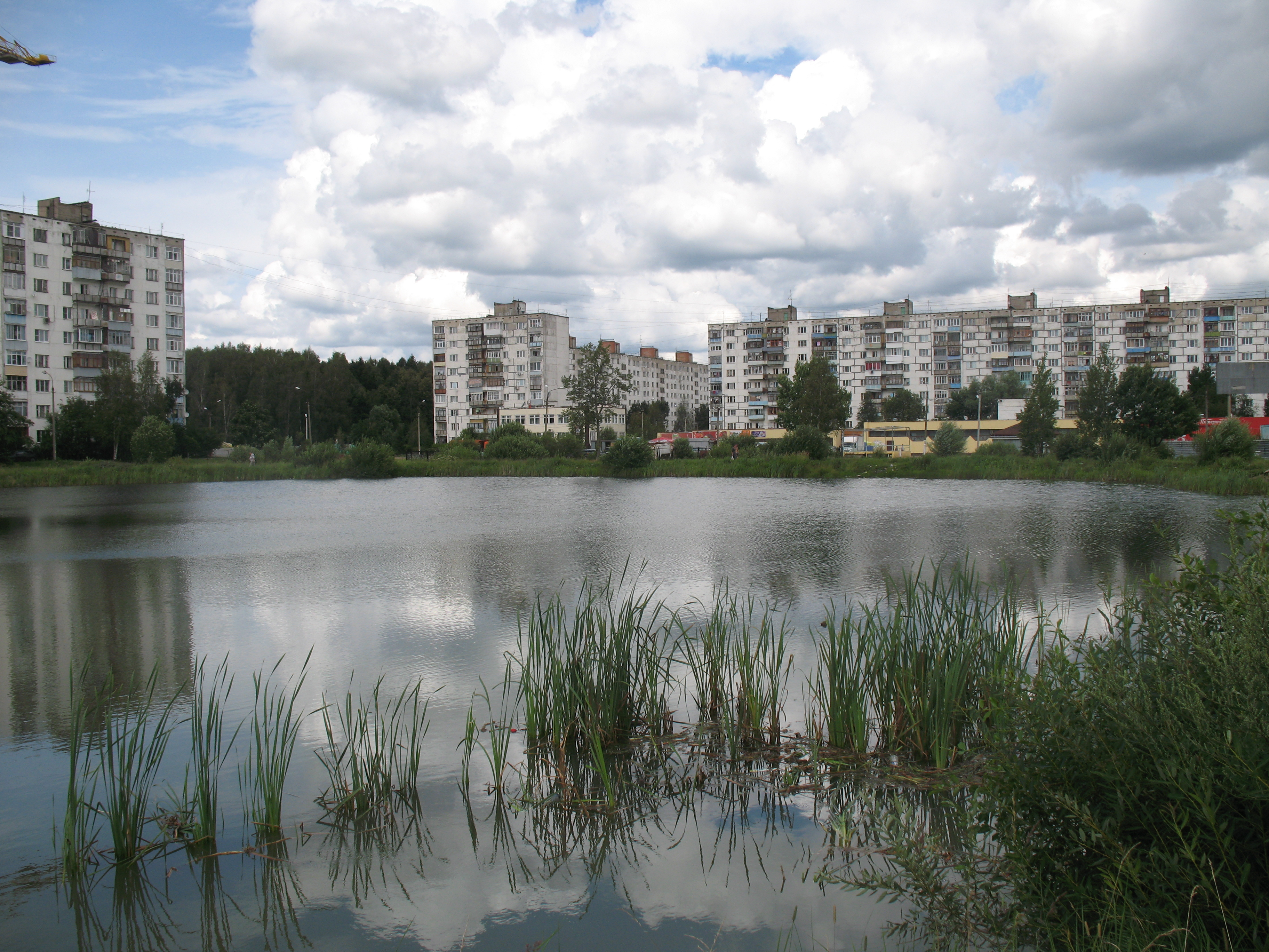 Посёлок Киевский.Вид на озеро с юга.